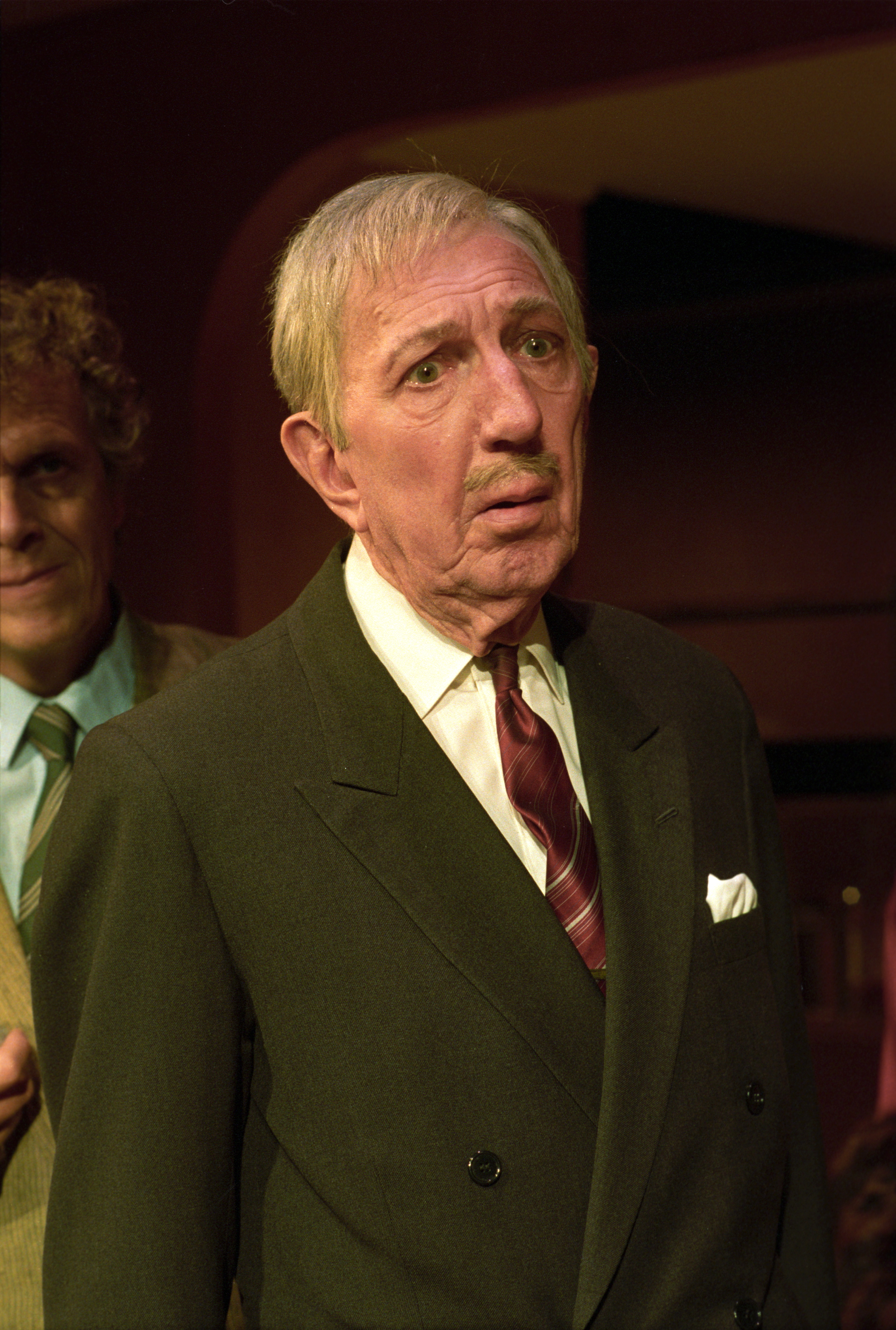 Scene fra Nationaltheaterets oppsetning av Alan Ayckbourns "Monki Bisniss". Nærbilde av Ken Ayres. Forestillingen hadde premiere 8. september 1989. Toralv Maurstad hadde regi og medvirkende var blant annet Tor Stokke som Jack, Kari Simonsen som Poppy og Leif Juster som Ken Ayres. Oslo